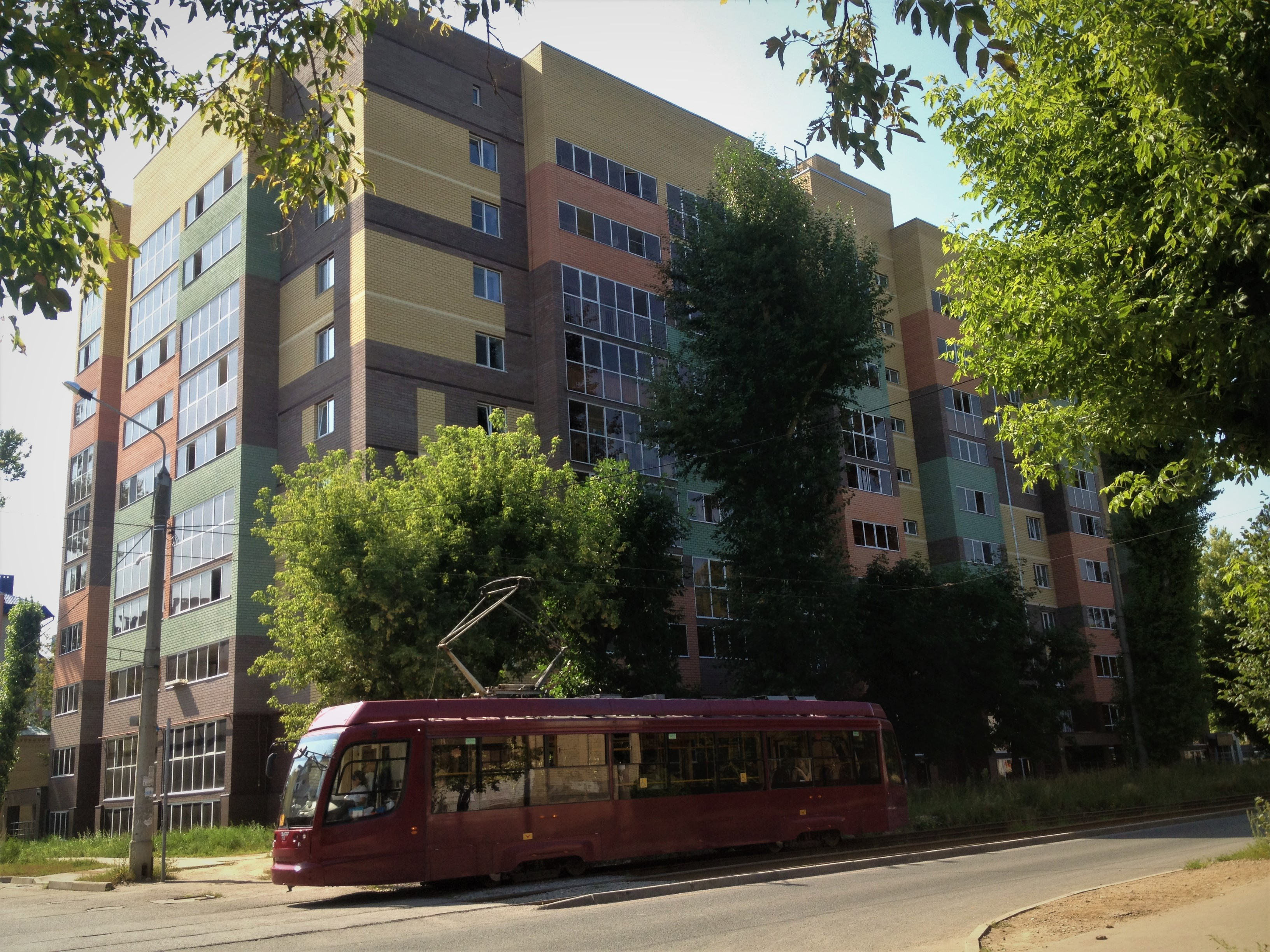 Улица Айдарова, дом 25 / 45 (г. Казань).